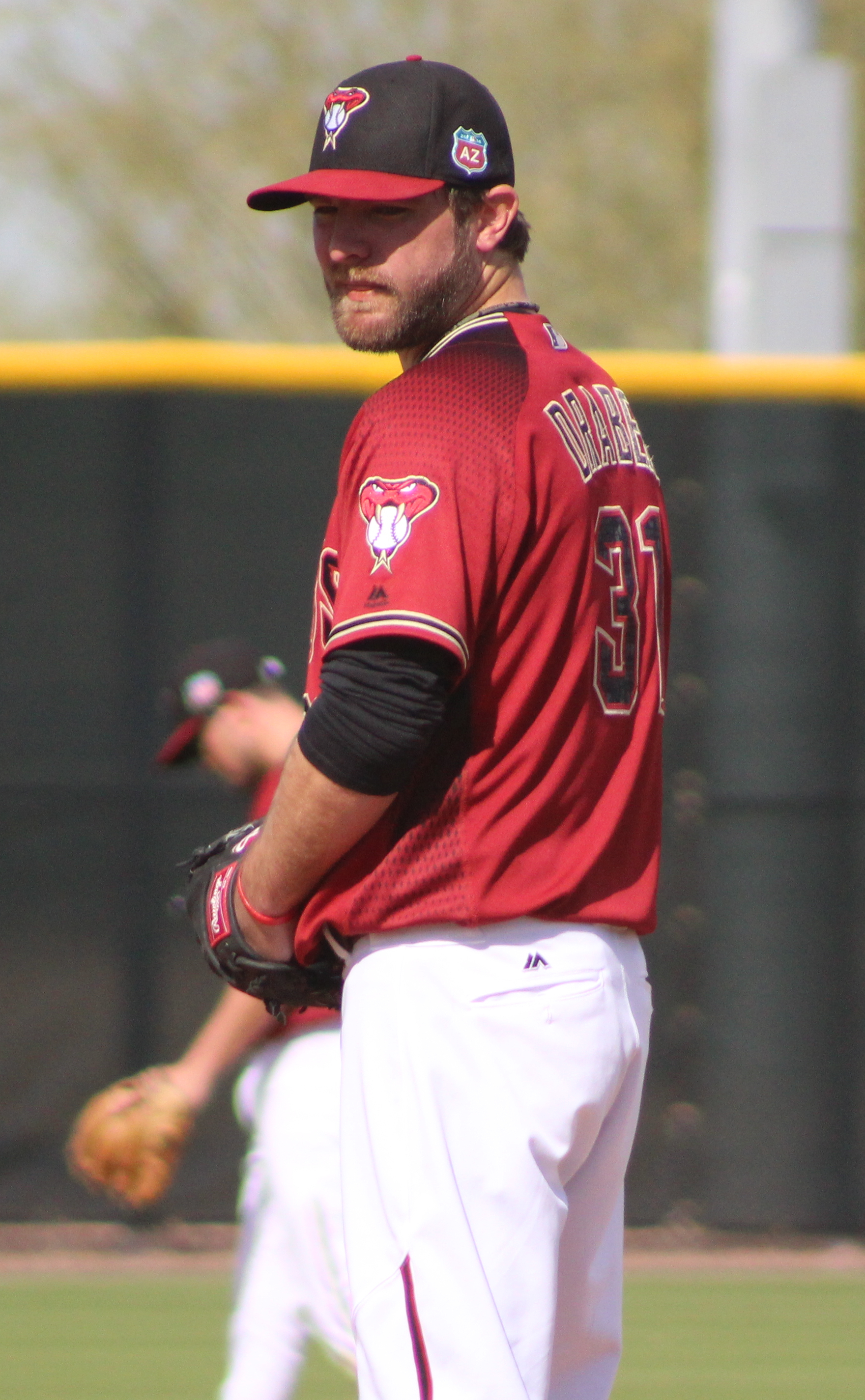 Kyle Drabek